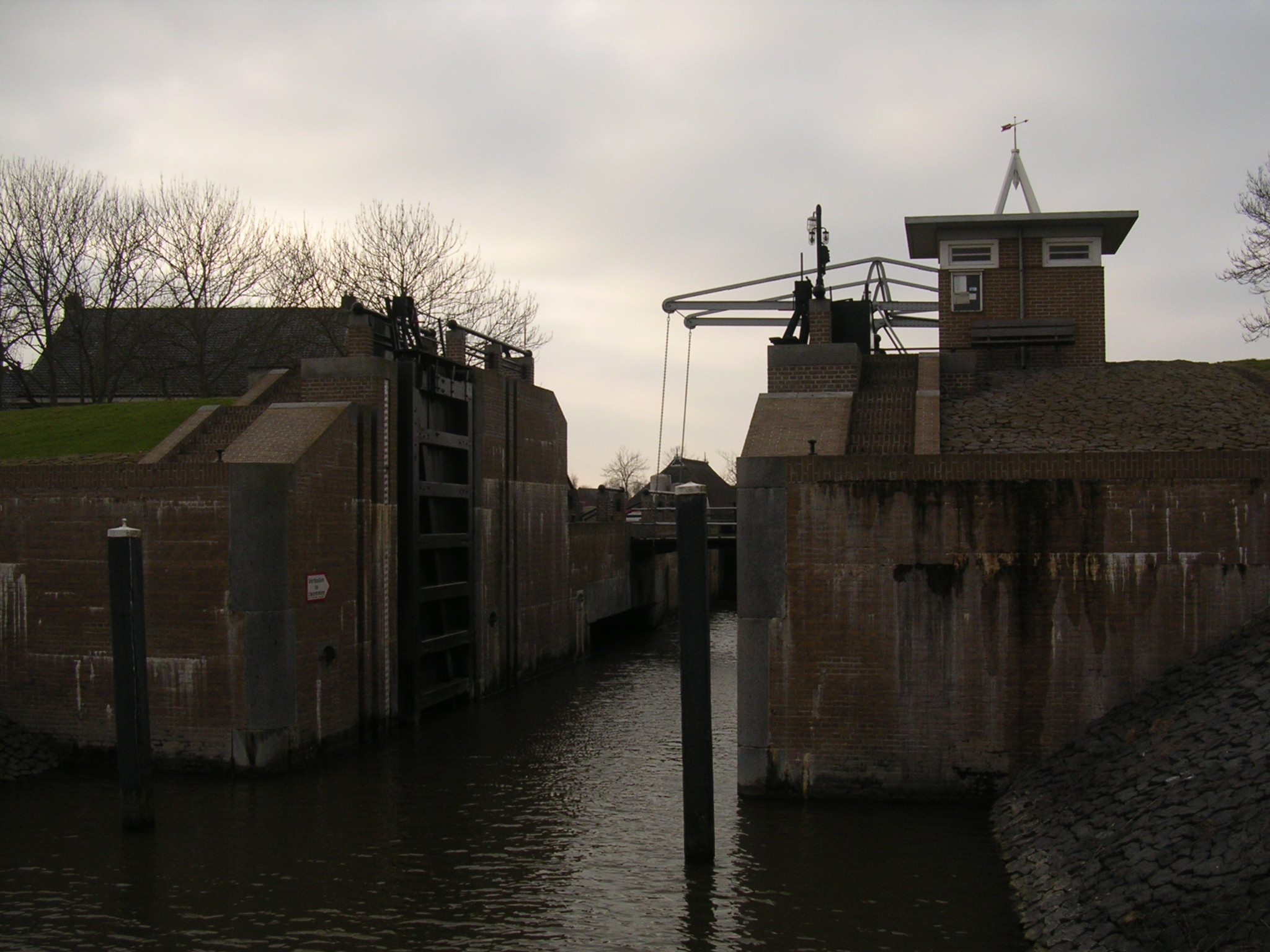 Sluis Ezumazijl